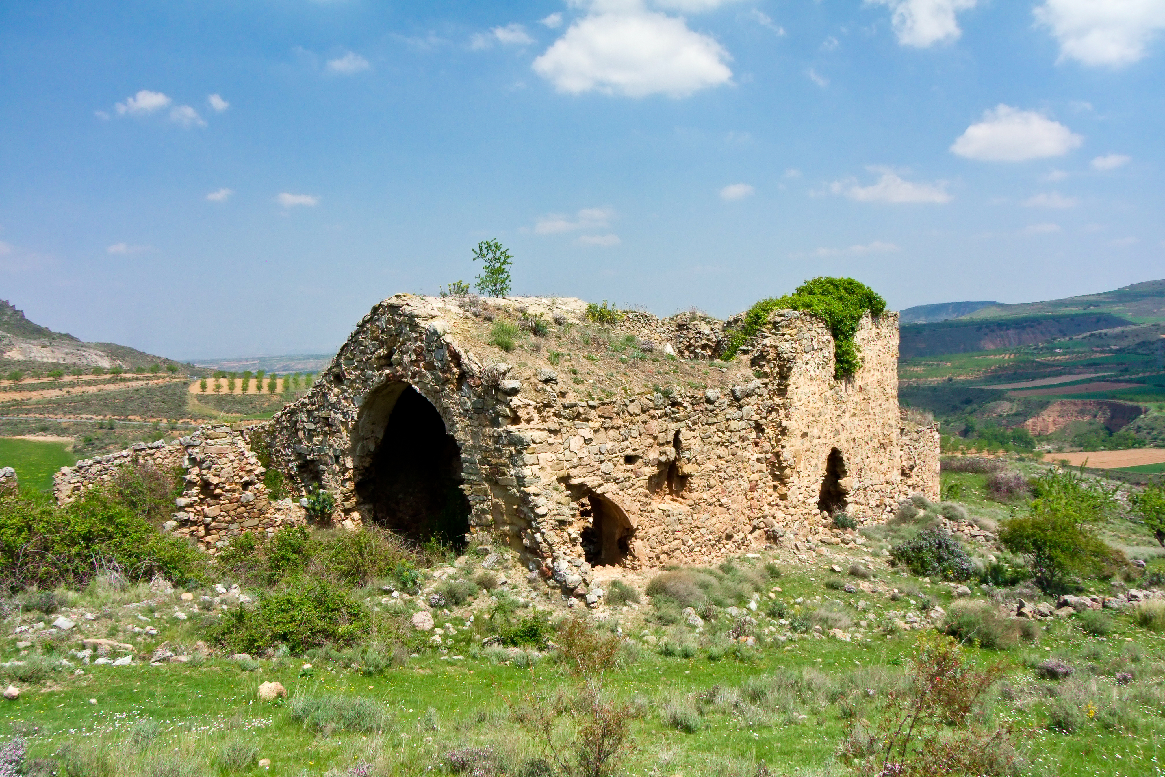 Ermita de Santiago en la localidad de Jubera, La Rioja - España